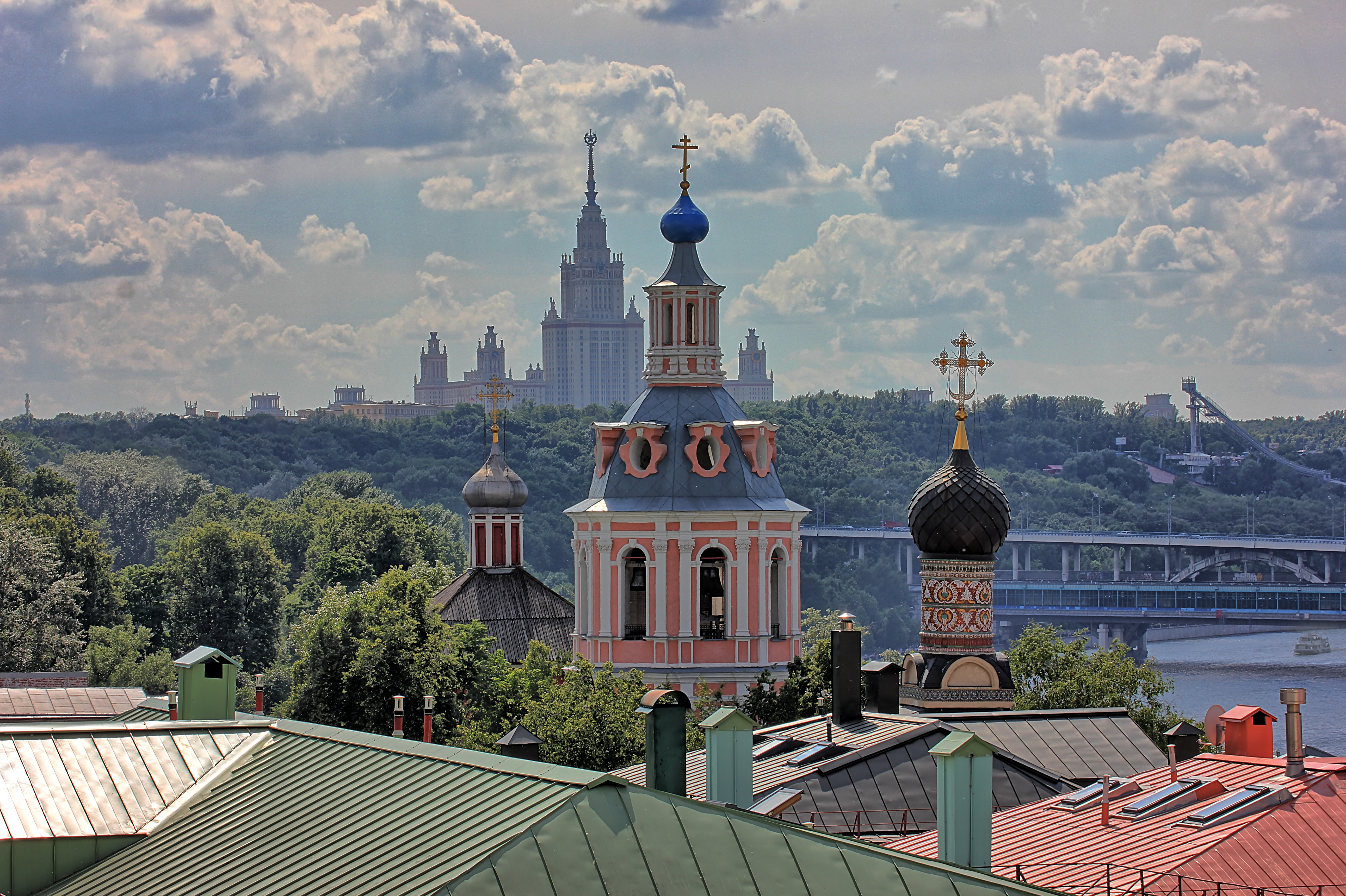 Вид на университет со стороны смотровой площадки у РАН.